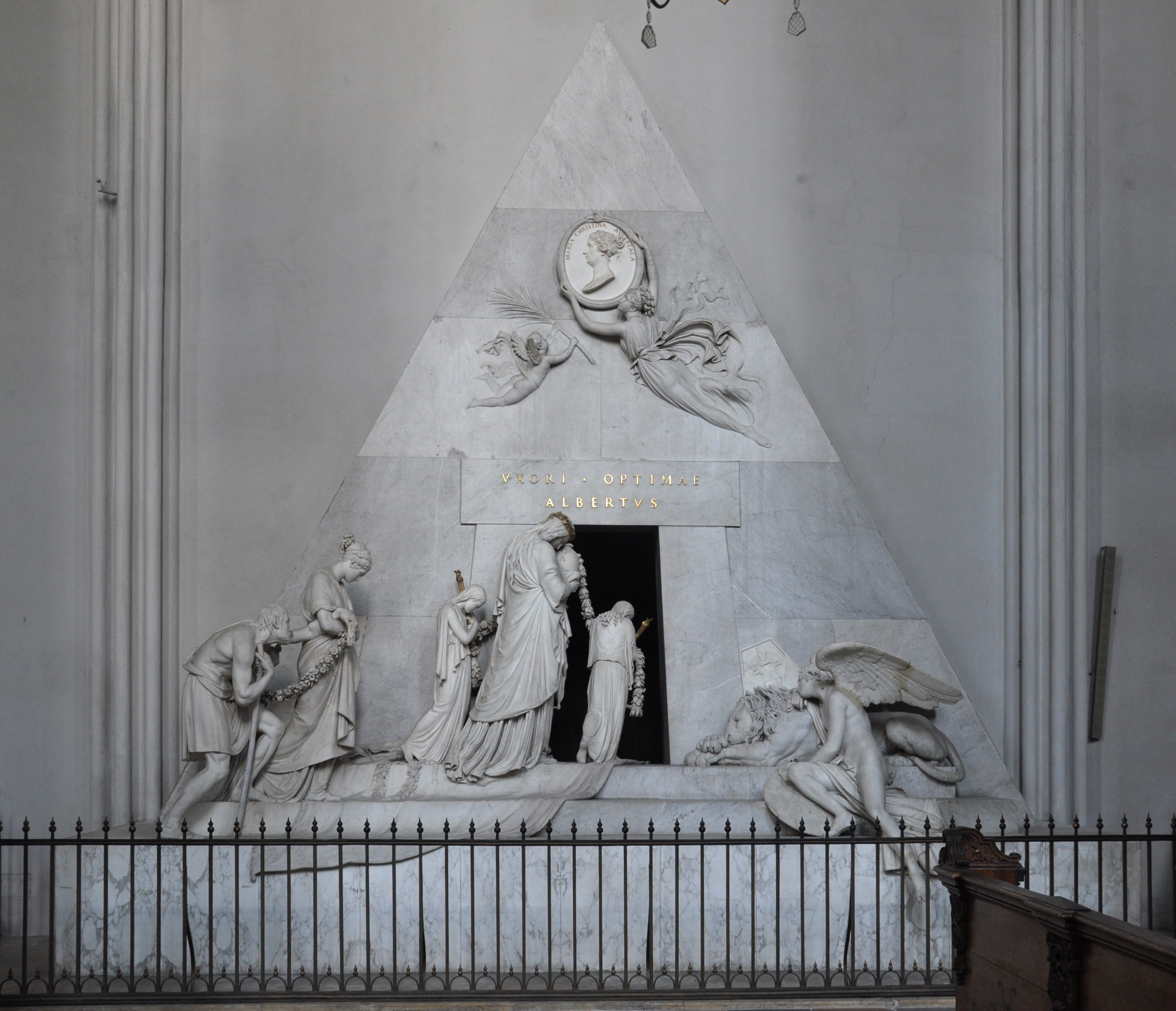 Wien, Augustinerkirche, Grabdenkmal für Erzherzogin Marie Christine von Antonio Canova, 1805